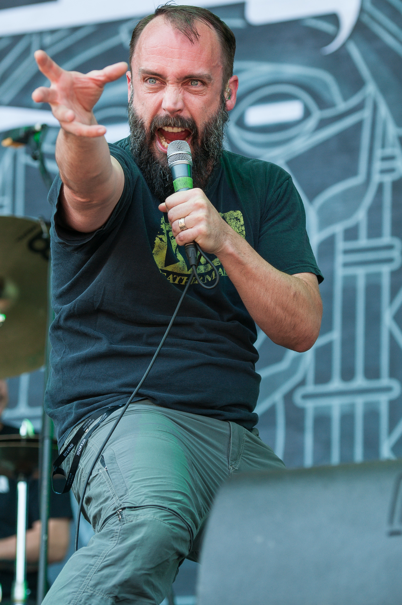 ARGO-Konzerte,Beck's Park Stage,Clutch,Festival,Konzert,Livekonzert,Livemusik,Musik,Neil Fallon,RiP,Rock im Park 2015